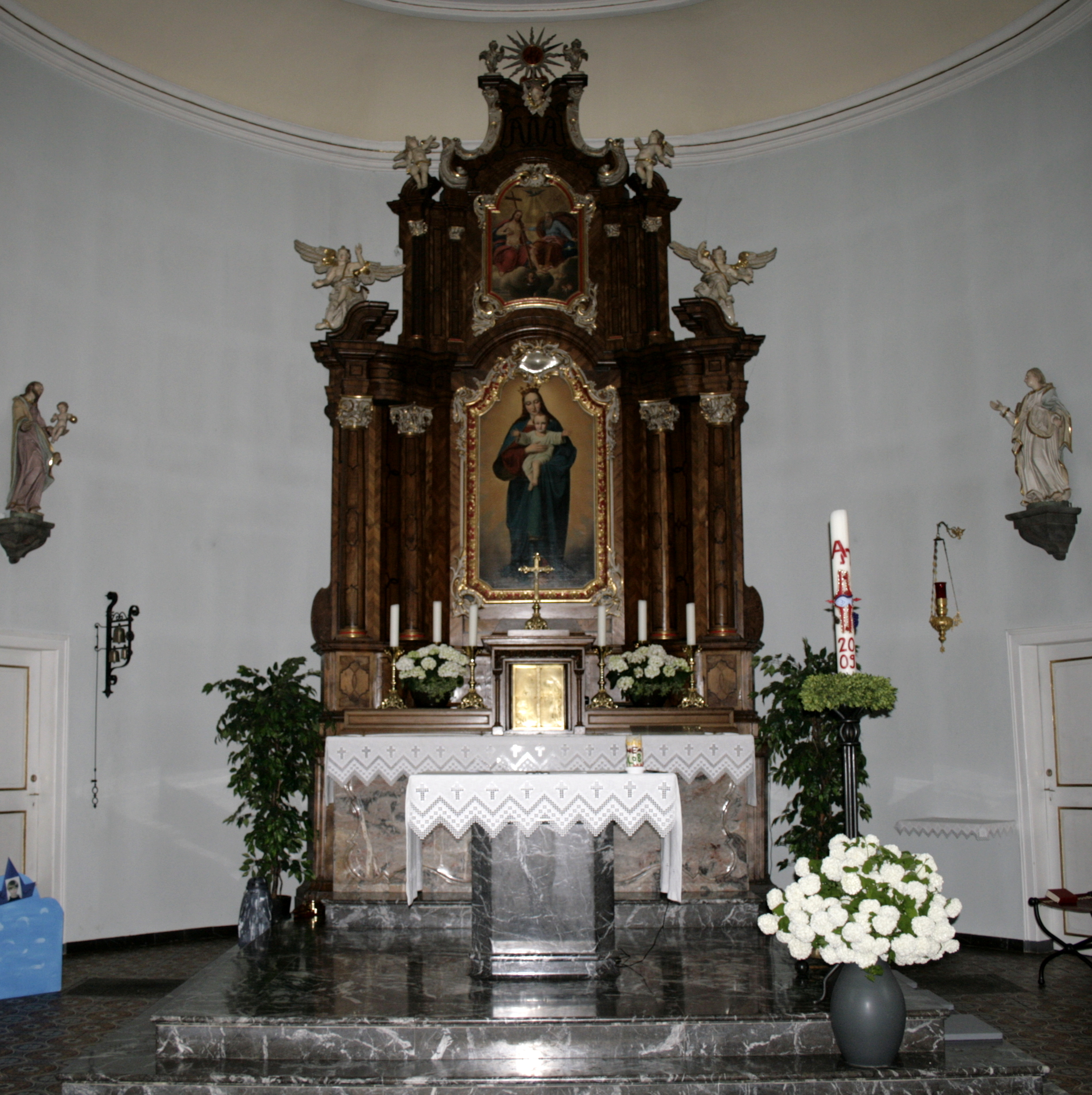 Altar der Pfarrkirche in Arfurt, Deutschland